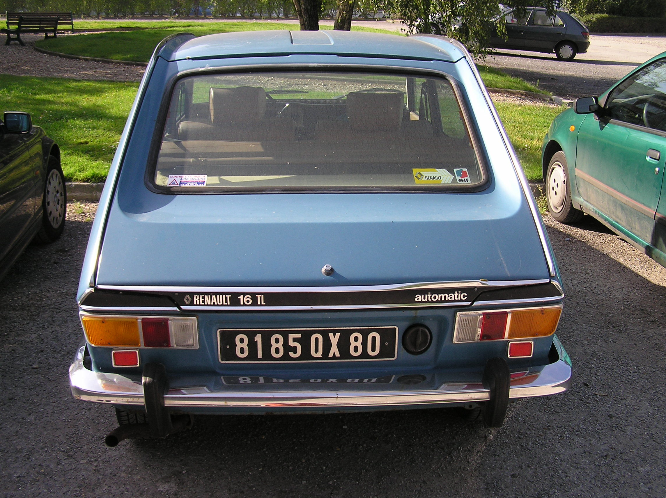 Renault 16 TL Automatic